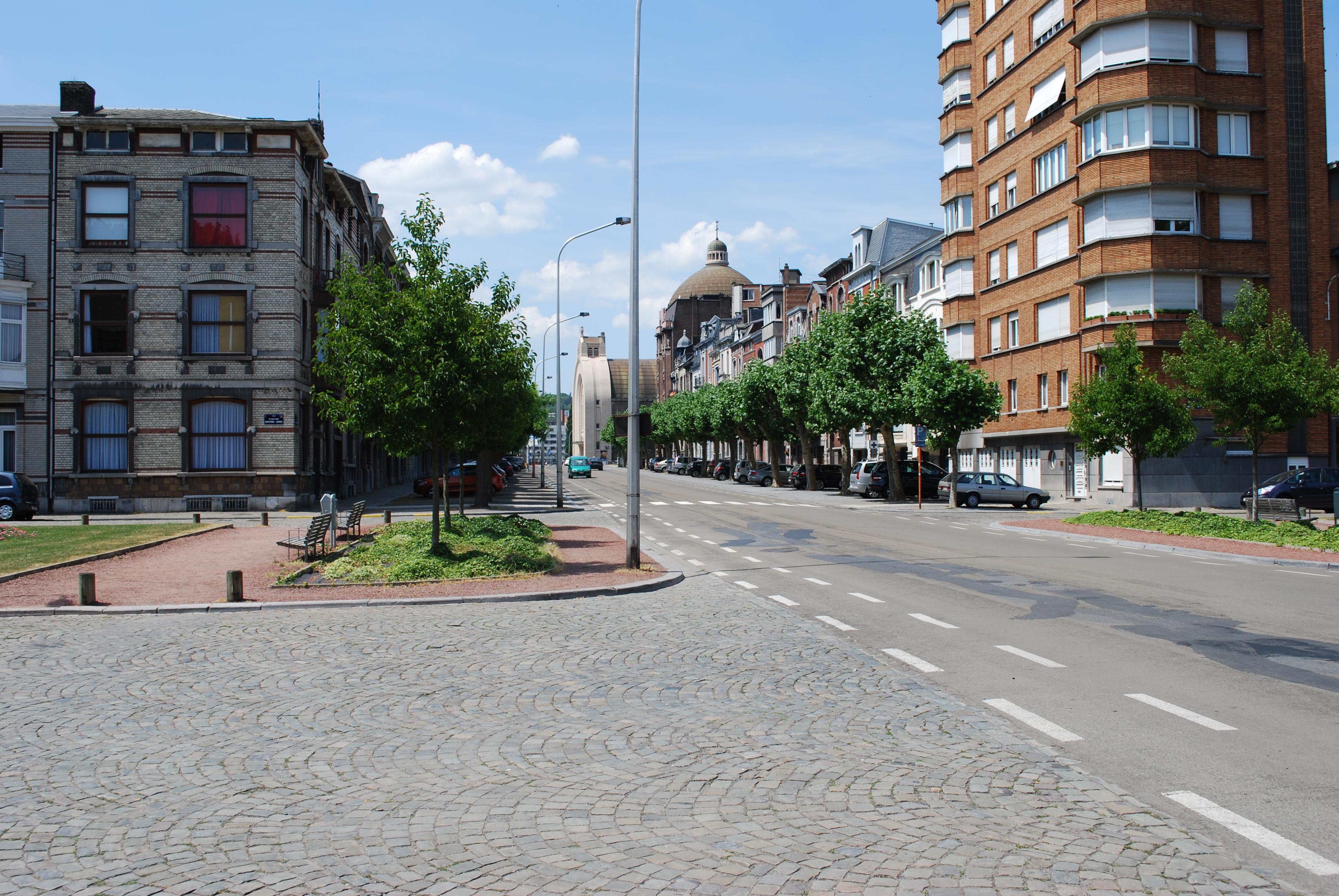 Liège : la place des Nations Unies, et l'avenue du Luxembourg, vers l'église Saint-Vincent.